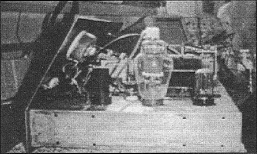 Oryginalny Generator Rife`a